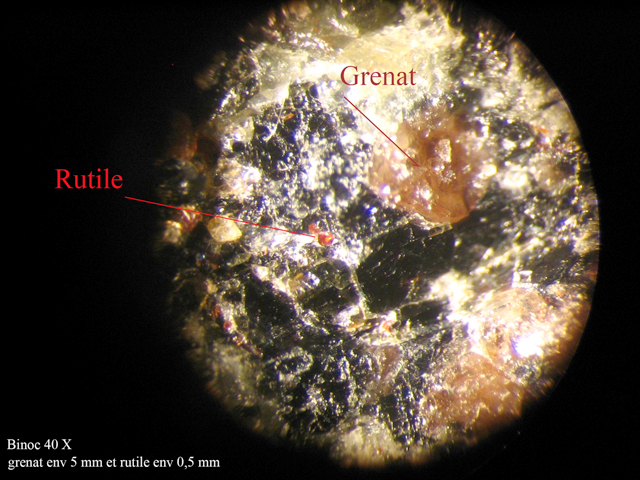 Eclogite avec cristal de rutile, prise de vue à la loupe binoculaire G=40x, taille du cristal de rutile: 0.5mm env. Echantillon provenant de St Philbert de grandlieu, Vendée, F